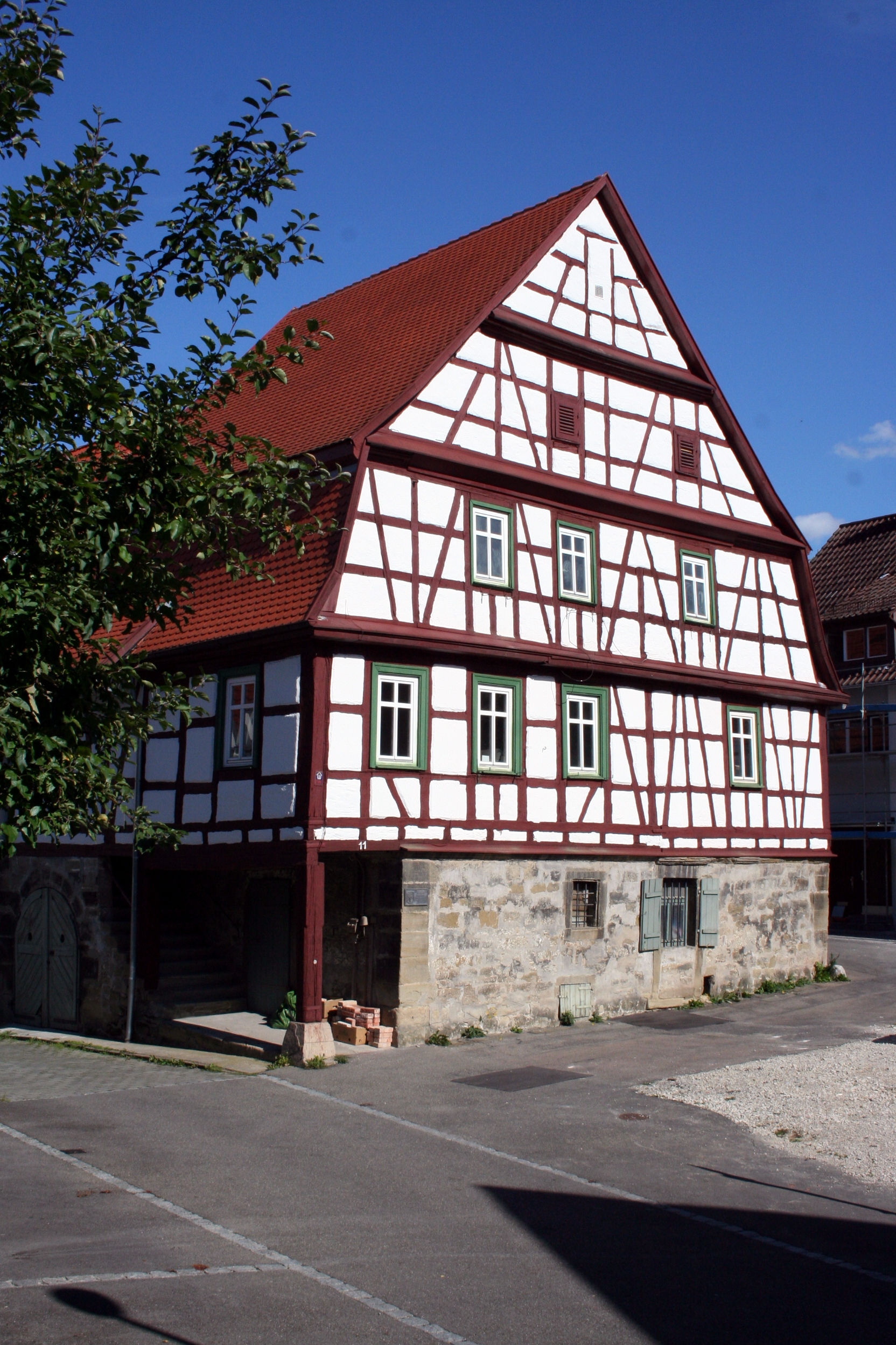 Klarahof in Stuttgart-Zazenhausen